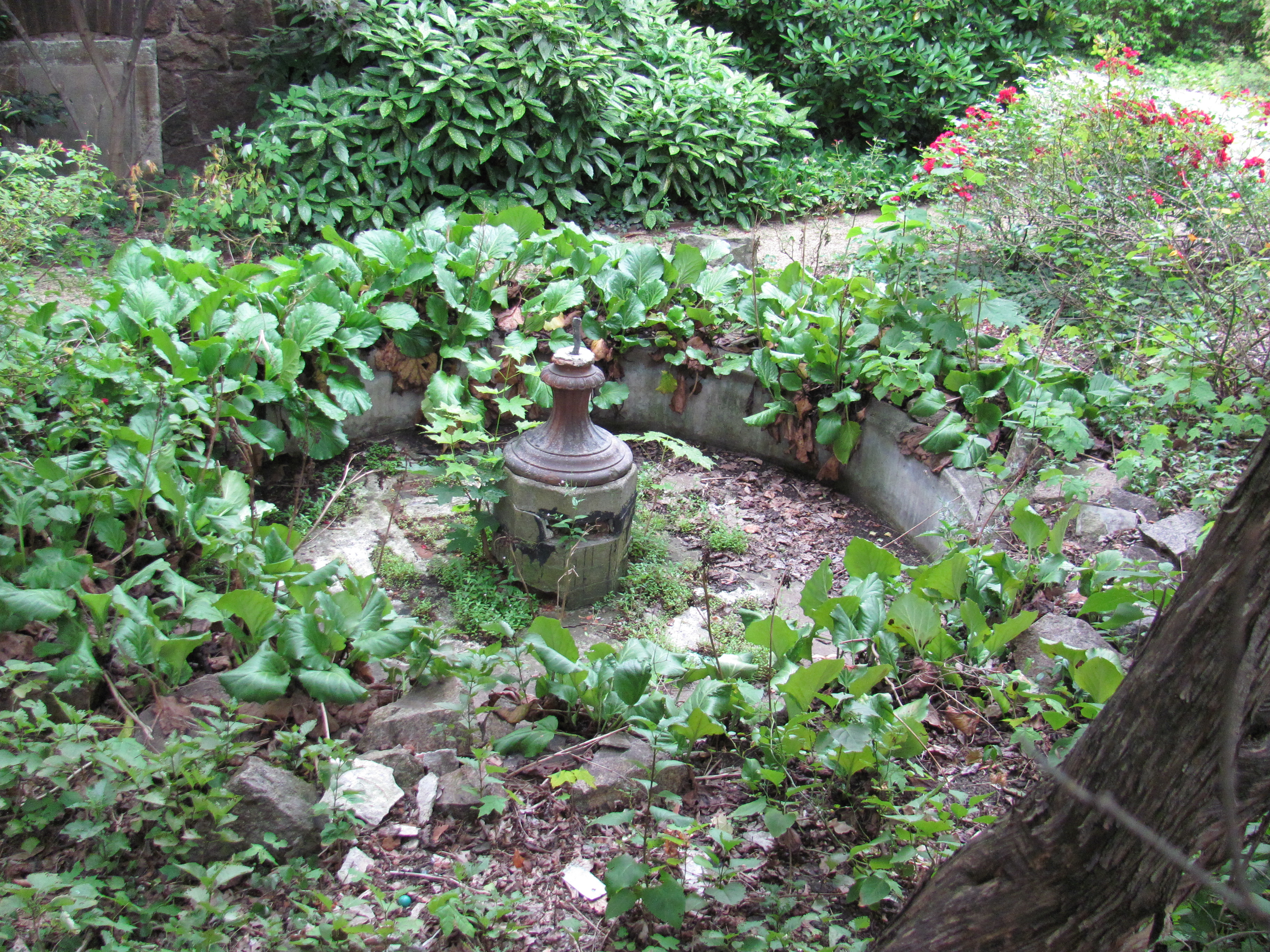 Villa Gustav Thoenes Wasserspielreste